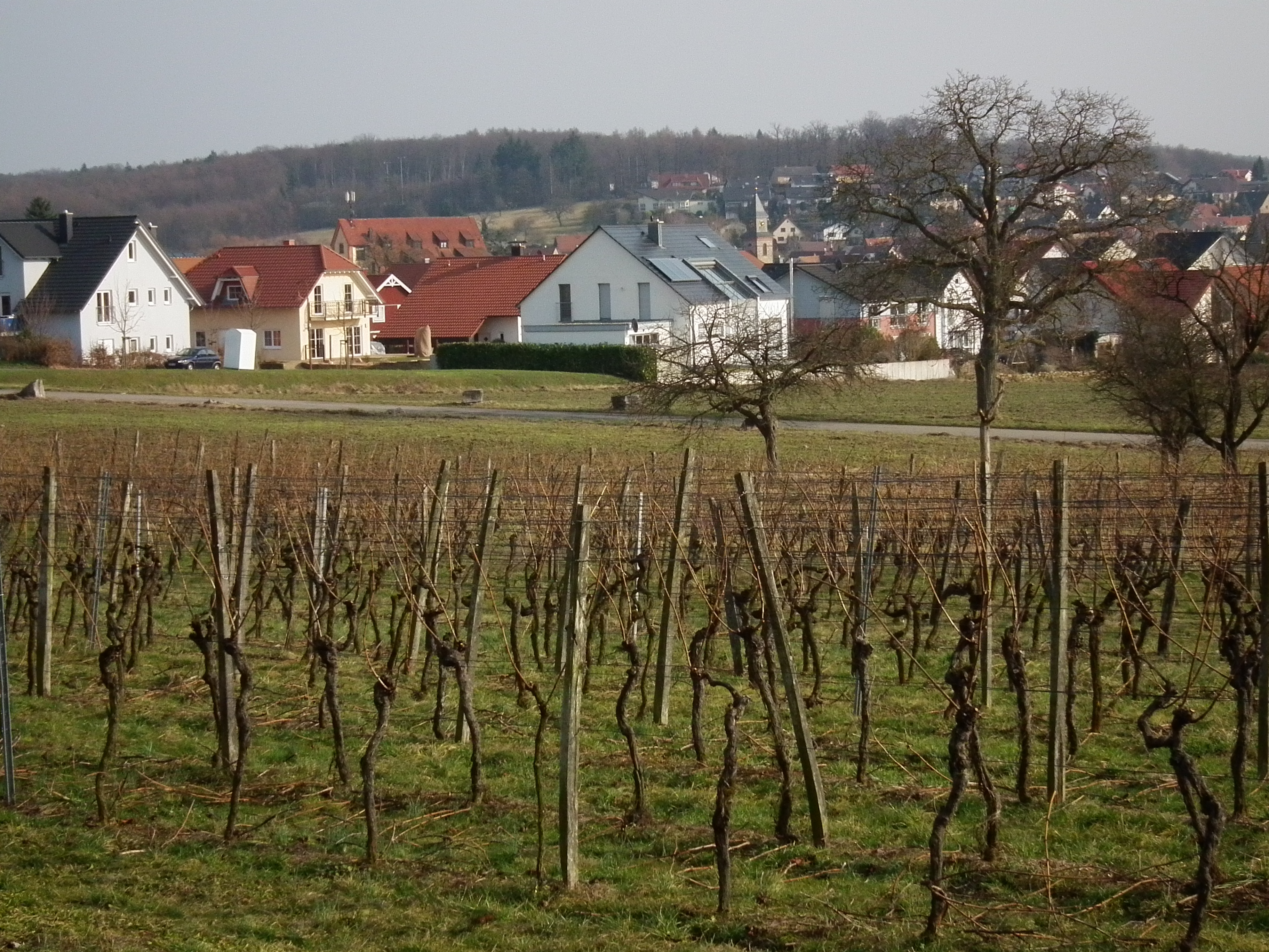 Von Malsch Blick auf Rettigheim (Rhein-Neckar-Kreis, Baden-Württemberg, Deutschland)